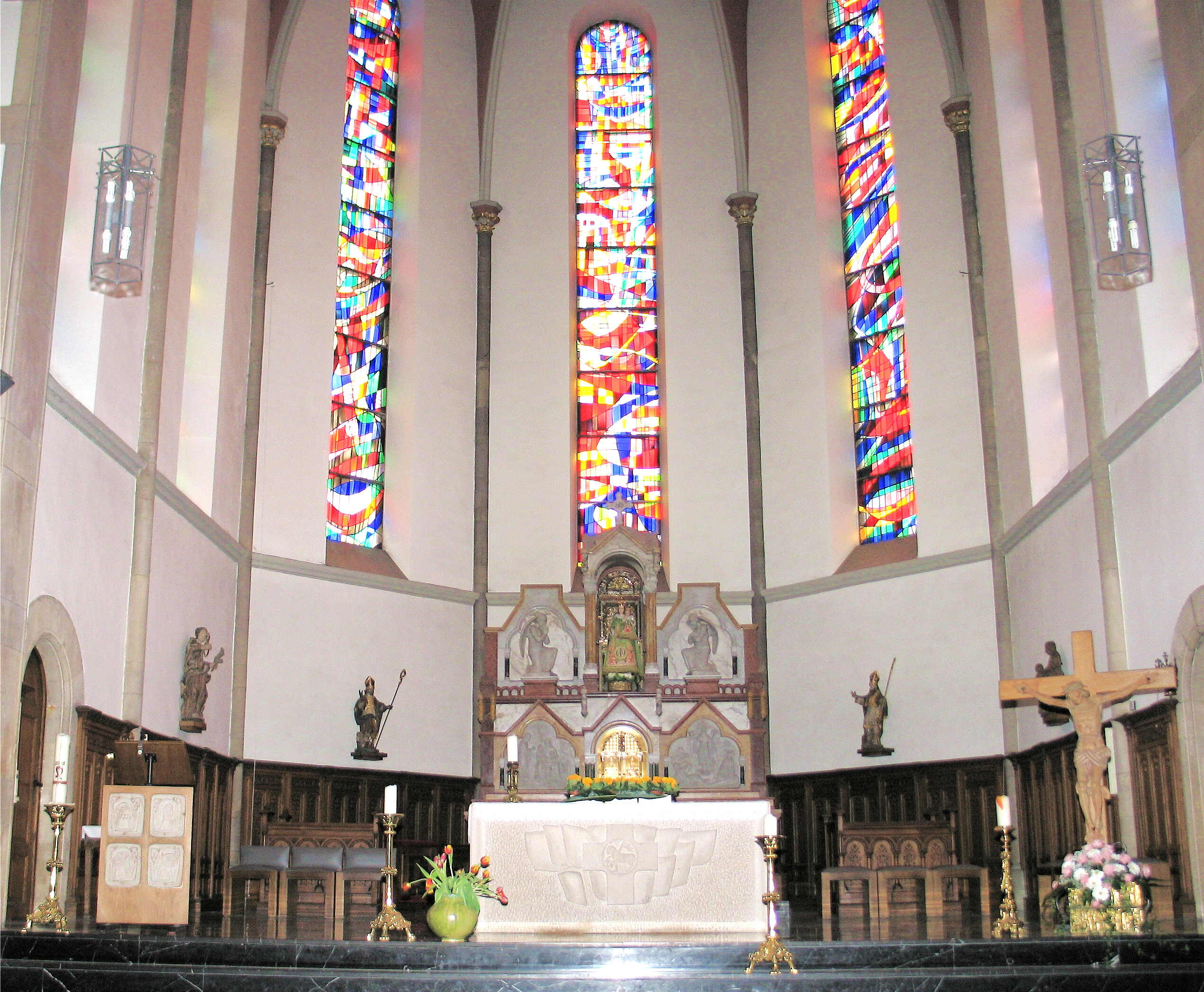 An der Kierch vu Beetebuerg